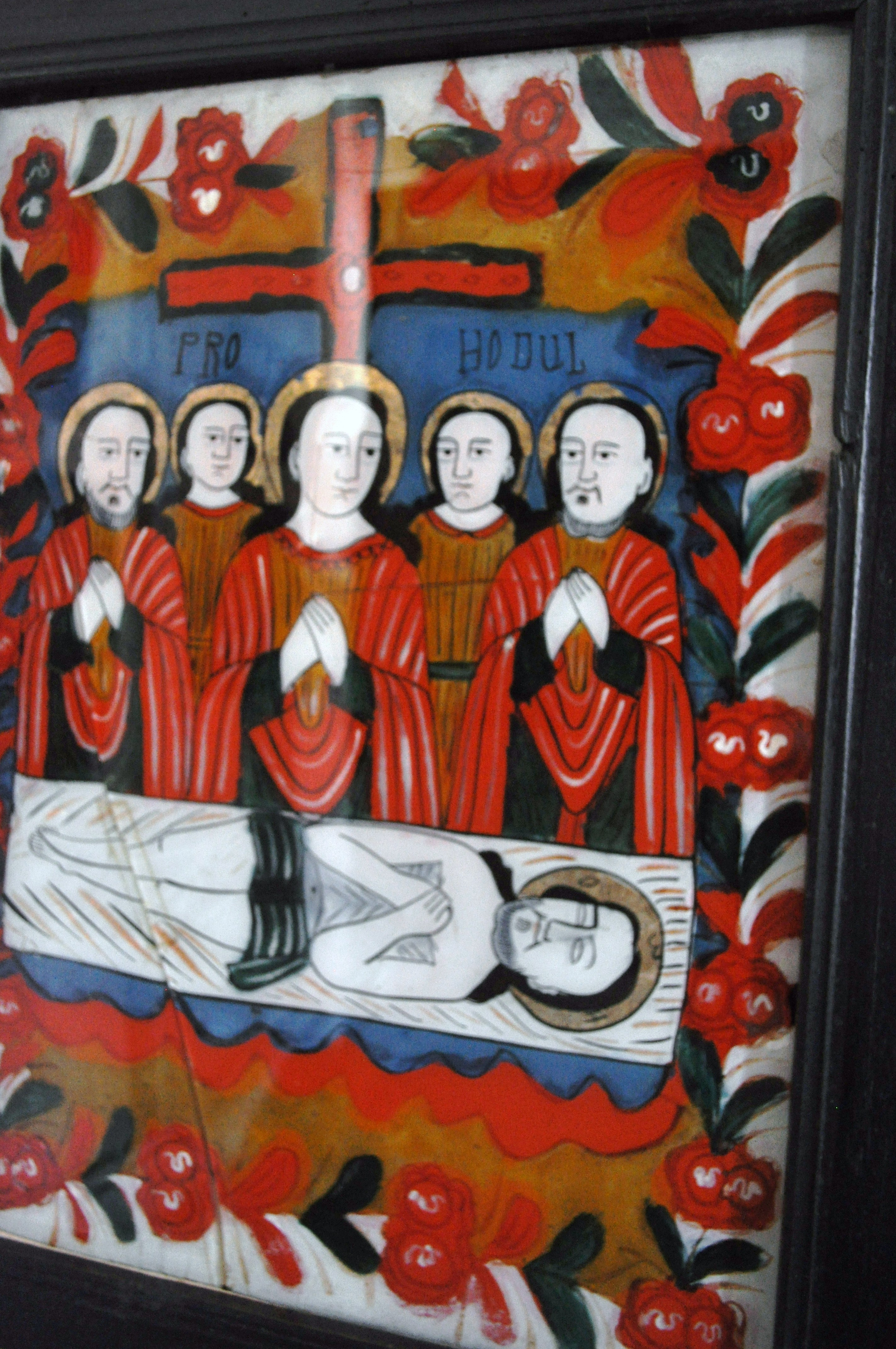 Muzeul de icoane pe sticlă „Pr.Zosim Oancea” din Sibiel